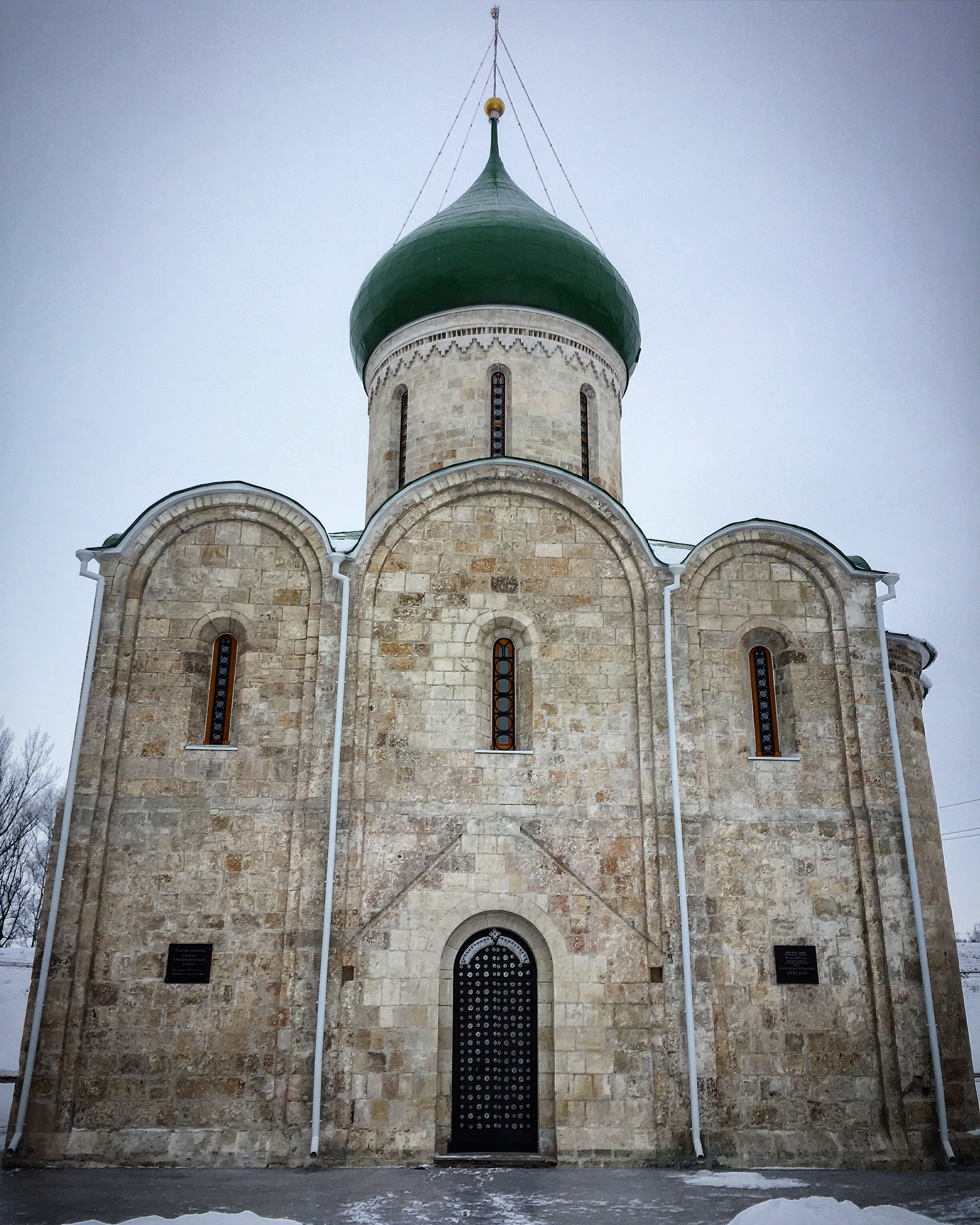 Spaso-Preobrazensky Cathedral in Pereslavl-Zalessky 2016